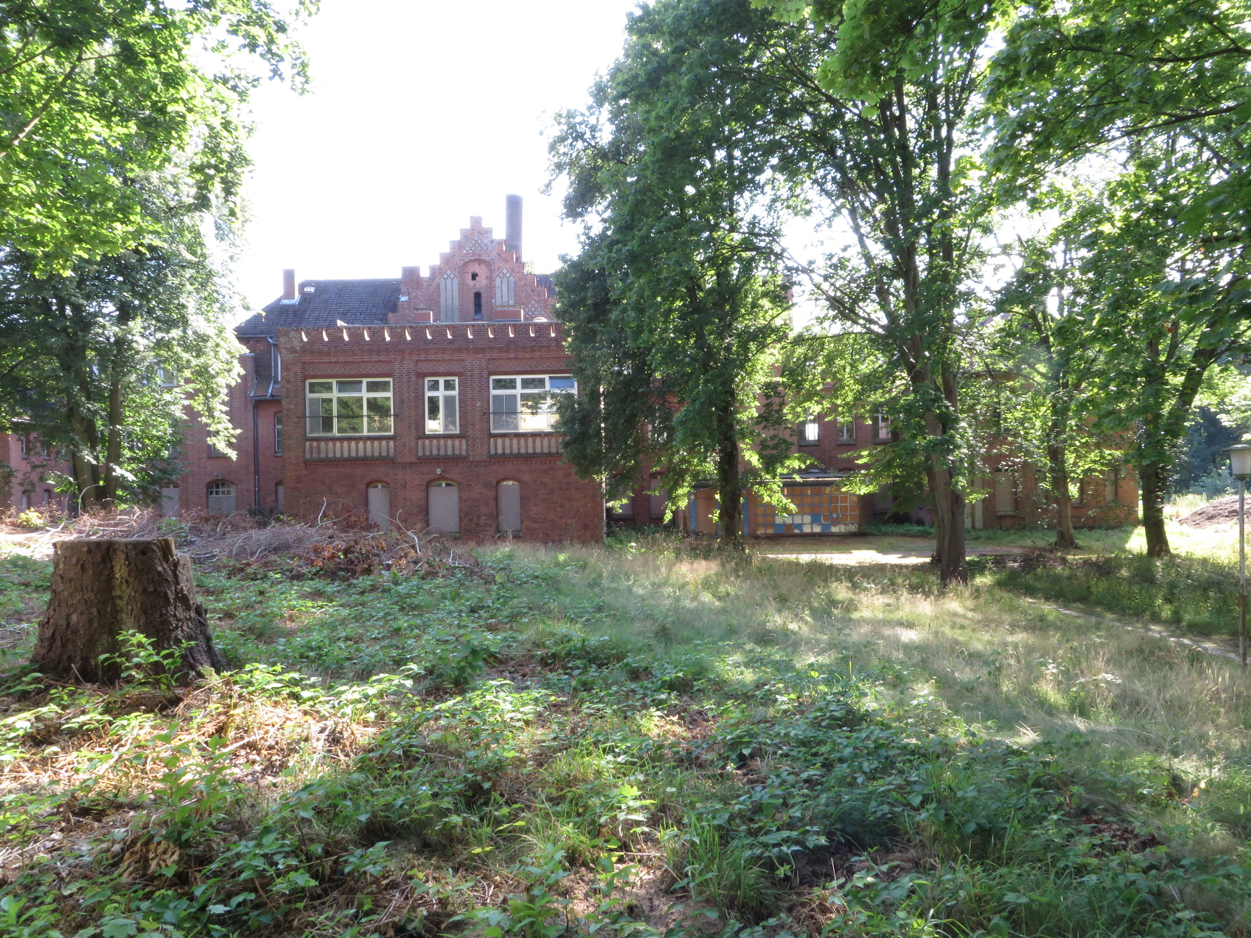 Vorburgbereich der Marine-Burg, Klinik-Ost, Marinelazarett Mürwik